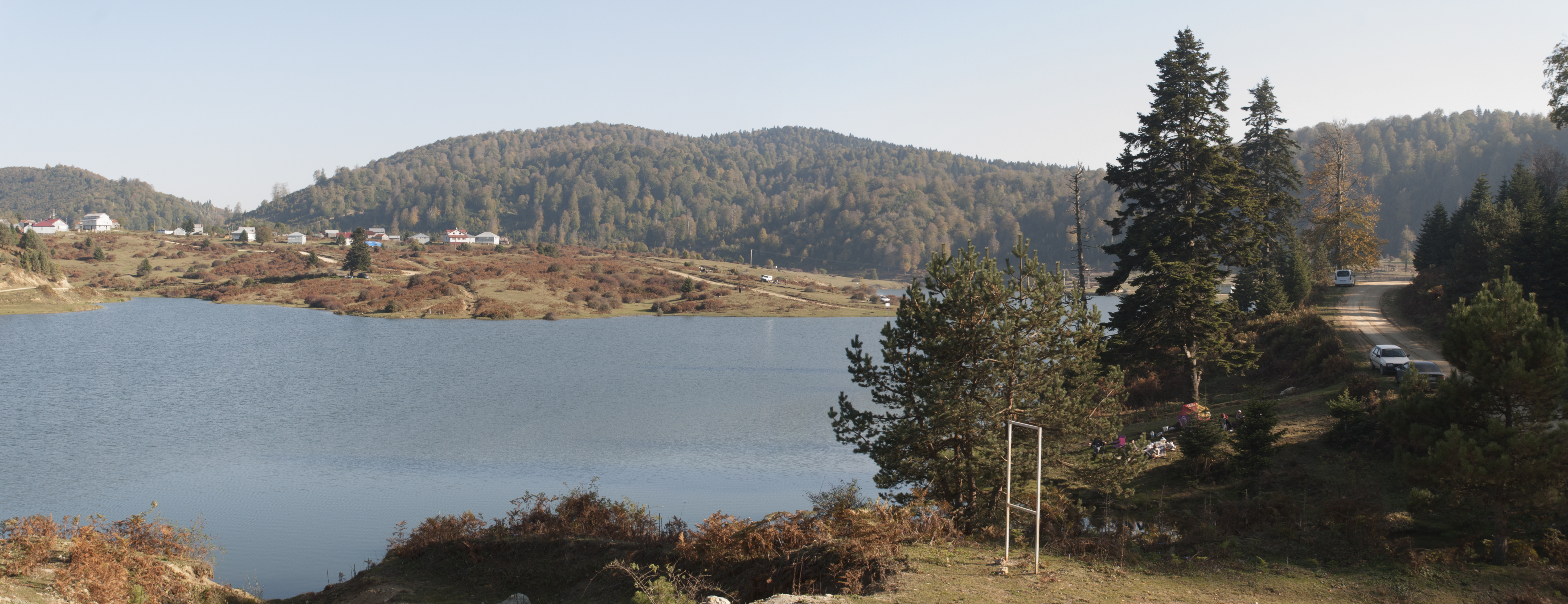 Acelle Yaylası Gölü, Akyazı ilçesi, Sakarya